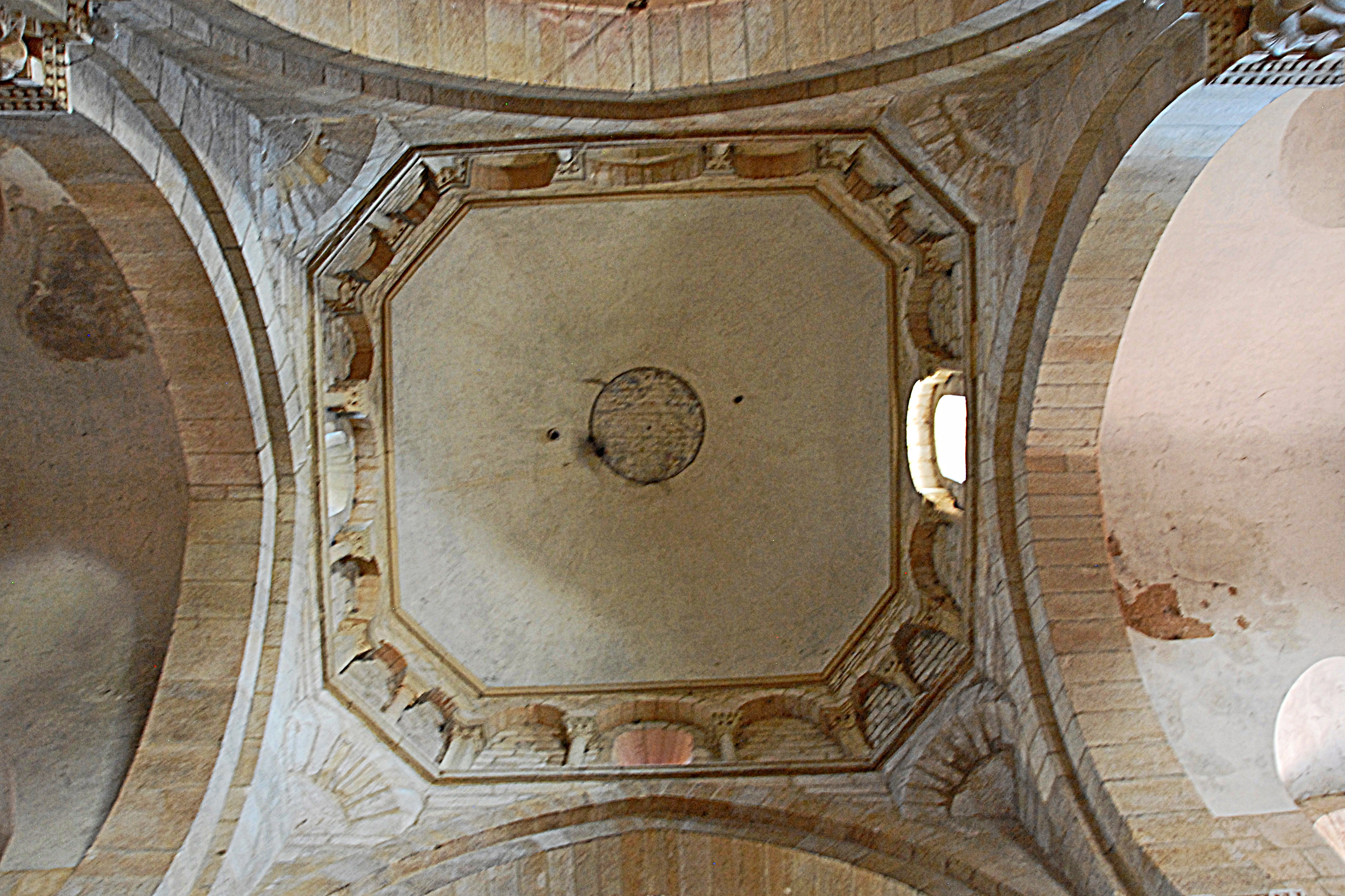 St-Hilaire de Semur-en-Brionnais, Vierungskuppel